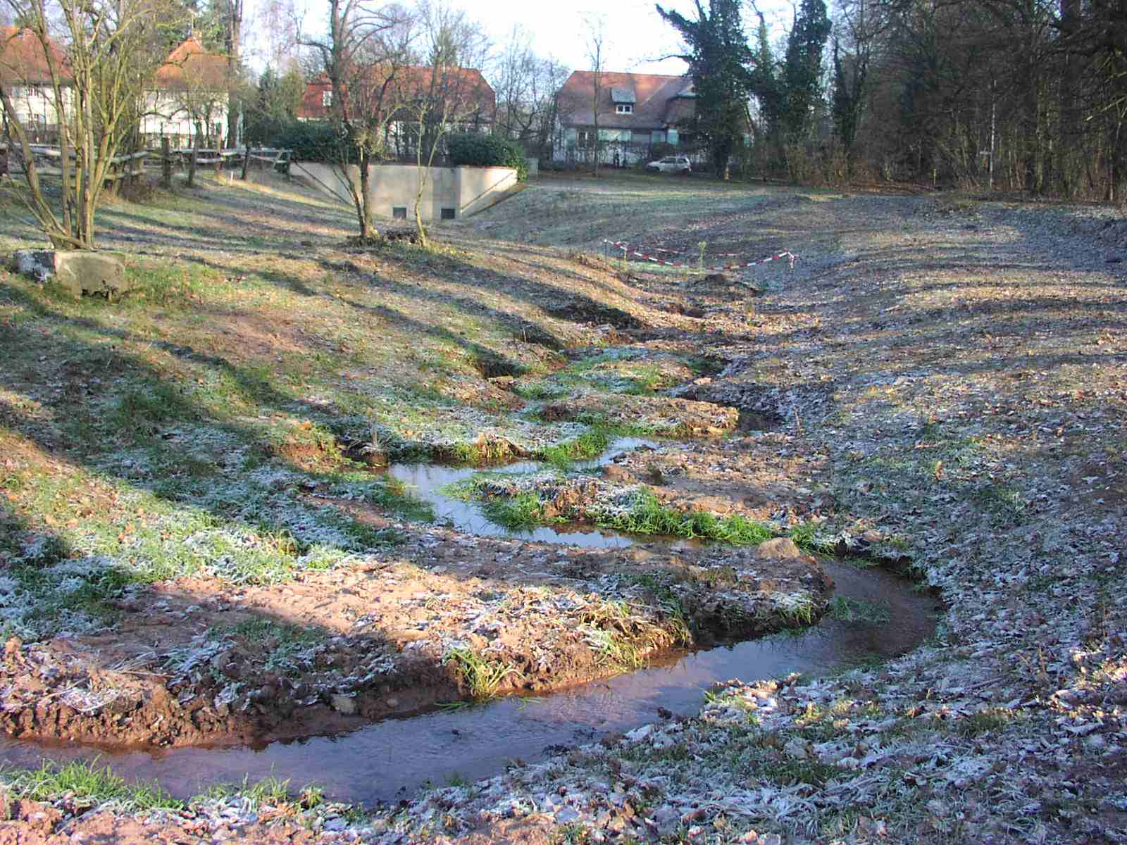 Meiereibach am Oberfeld in Darmstadt